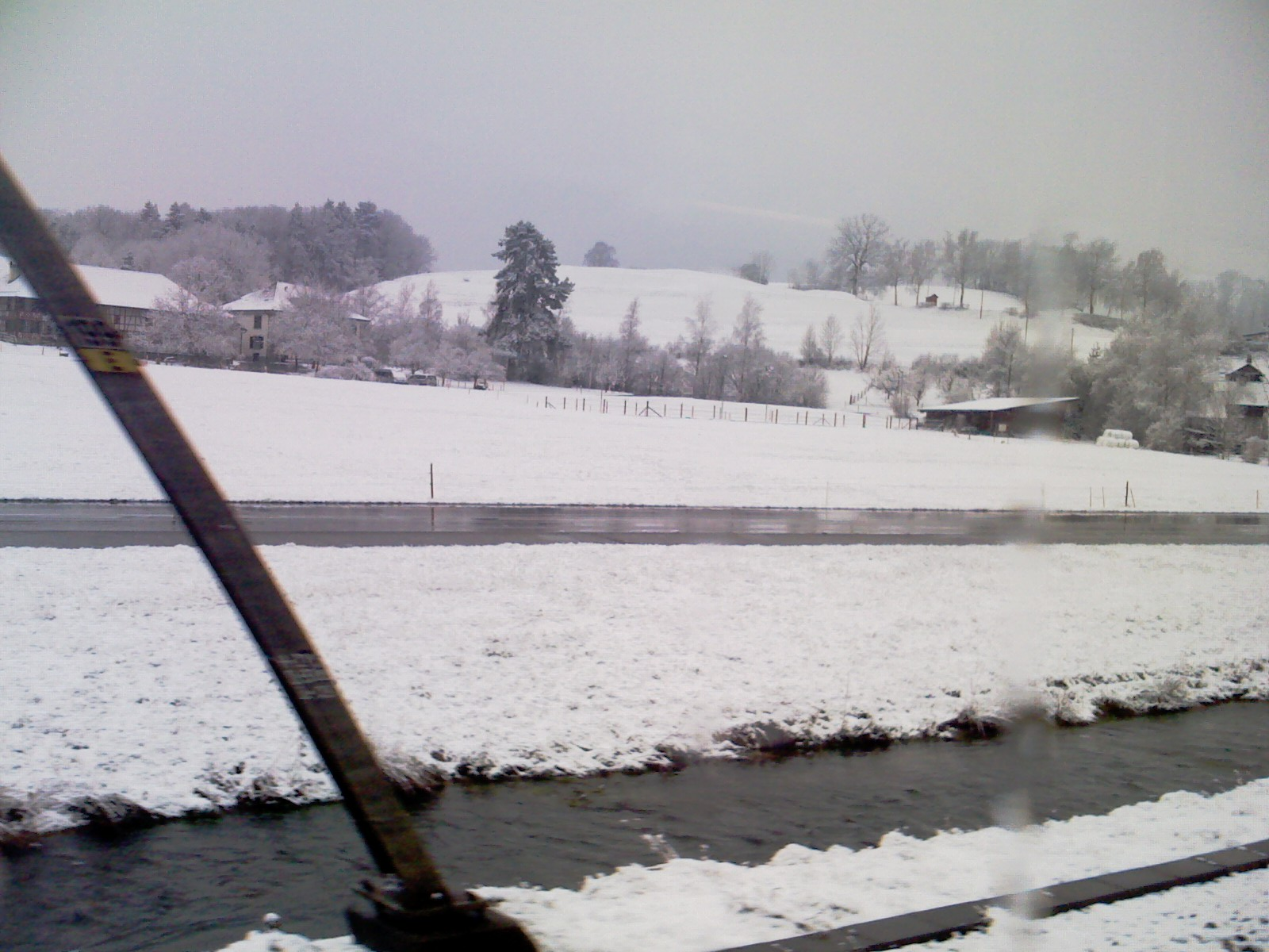 Eulach between Schottikon and Räterschen, Canton Zurich, Switzerland - Eulach inter Schottikon kaj Räterschen, Kantono Zuriko, Svislando